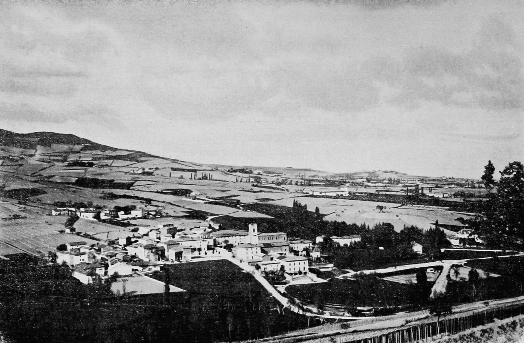 Dictionnaire illustré des communes du département du Rhône. Tome 2 / par MM. E. de Rolland et D. Clouzet.